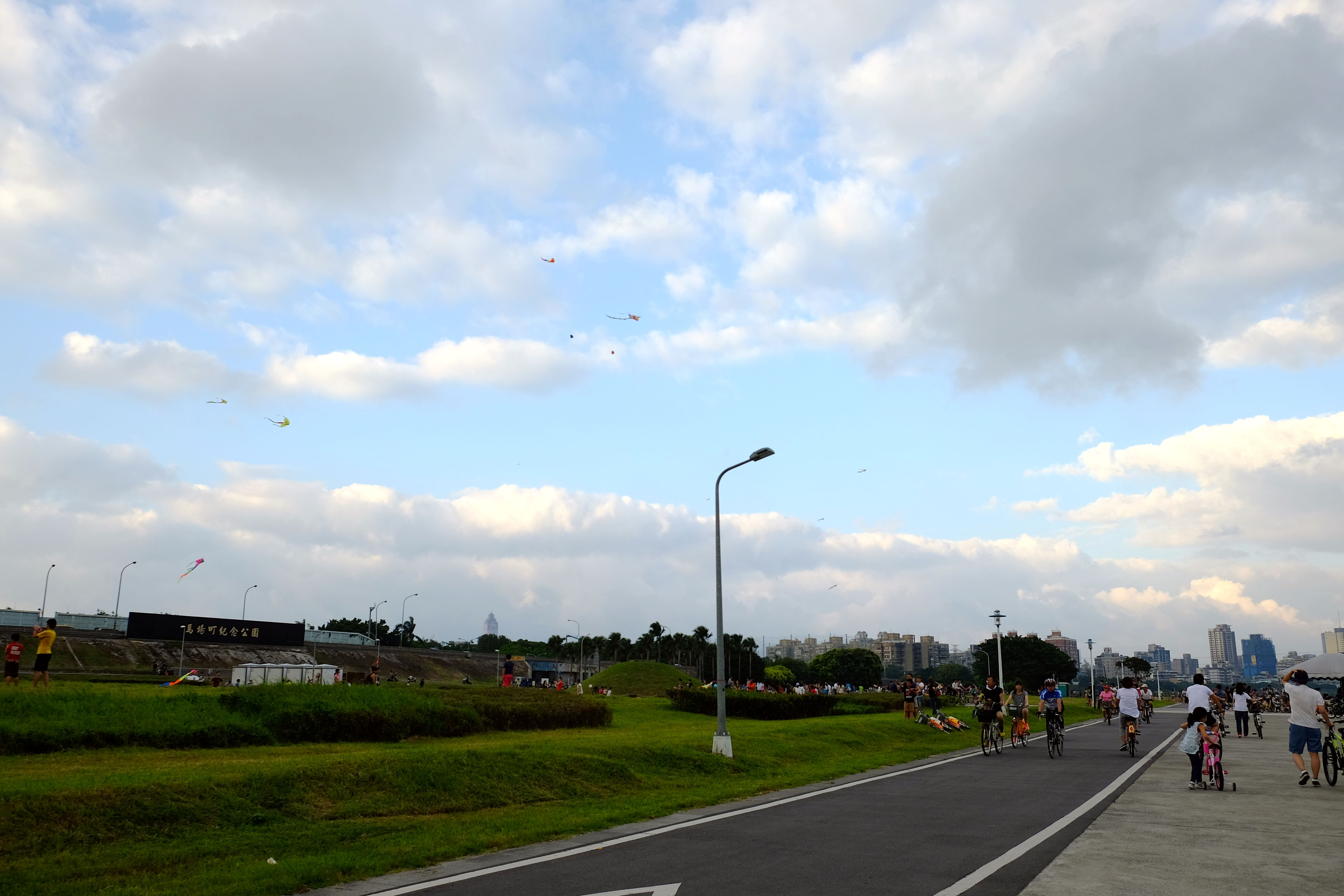 馬場町紀念公園